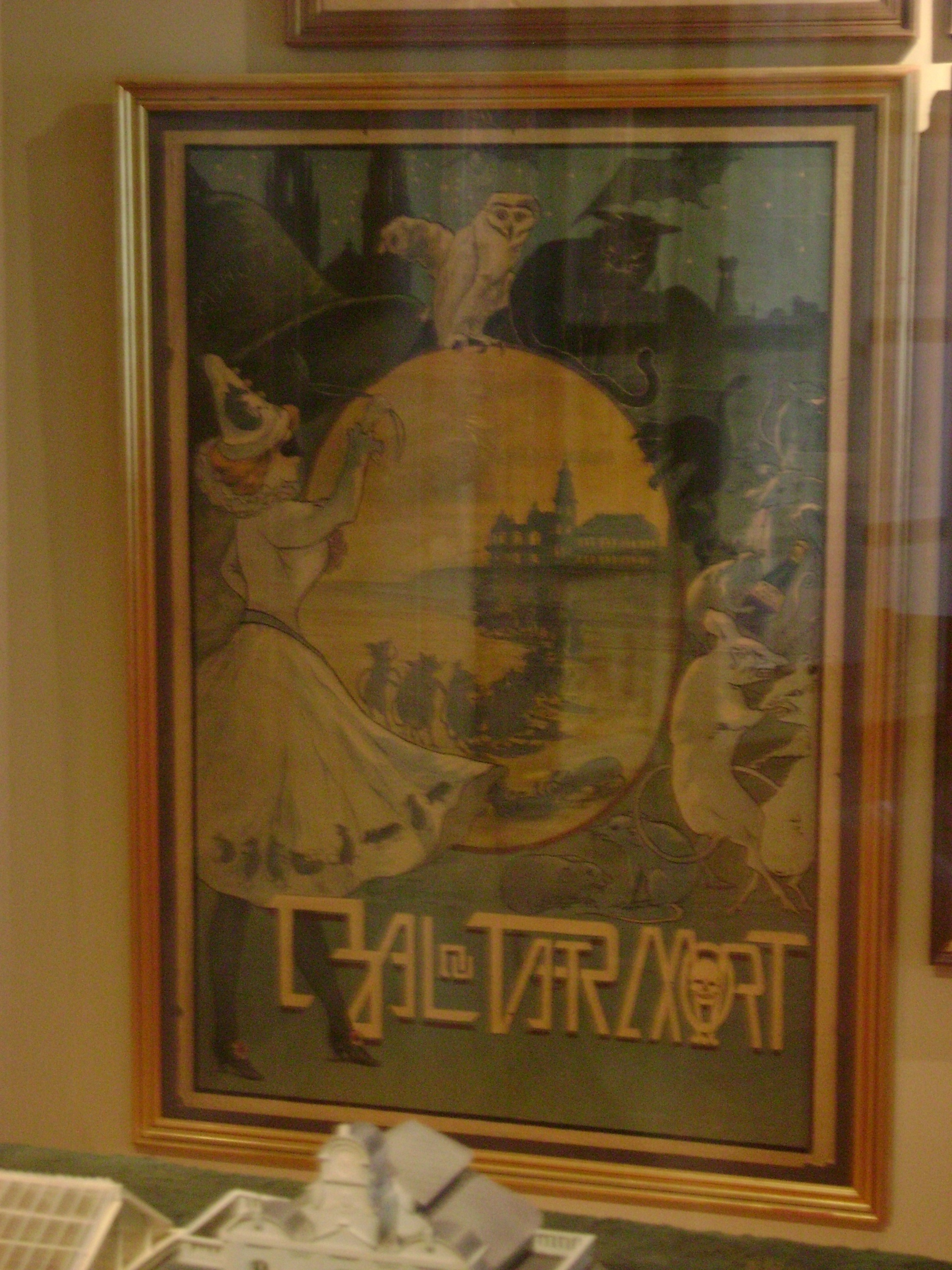 Affiche du Bal du rat mort. - Museum De Plate Oostende